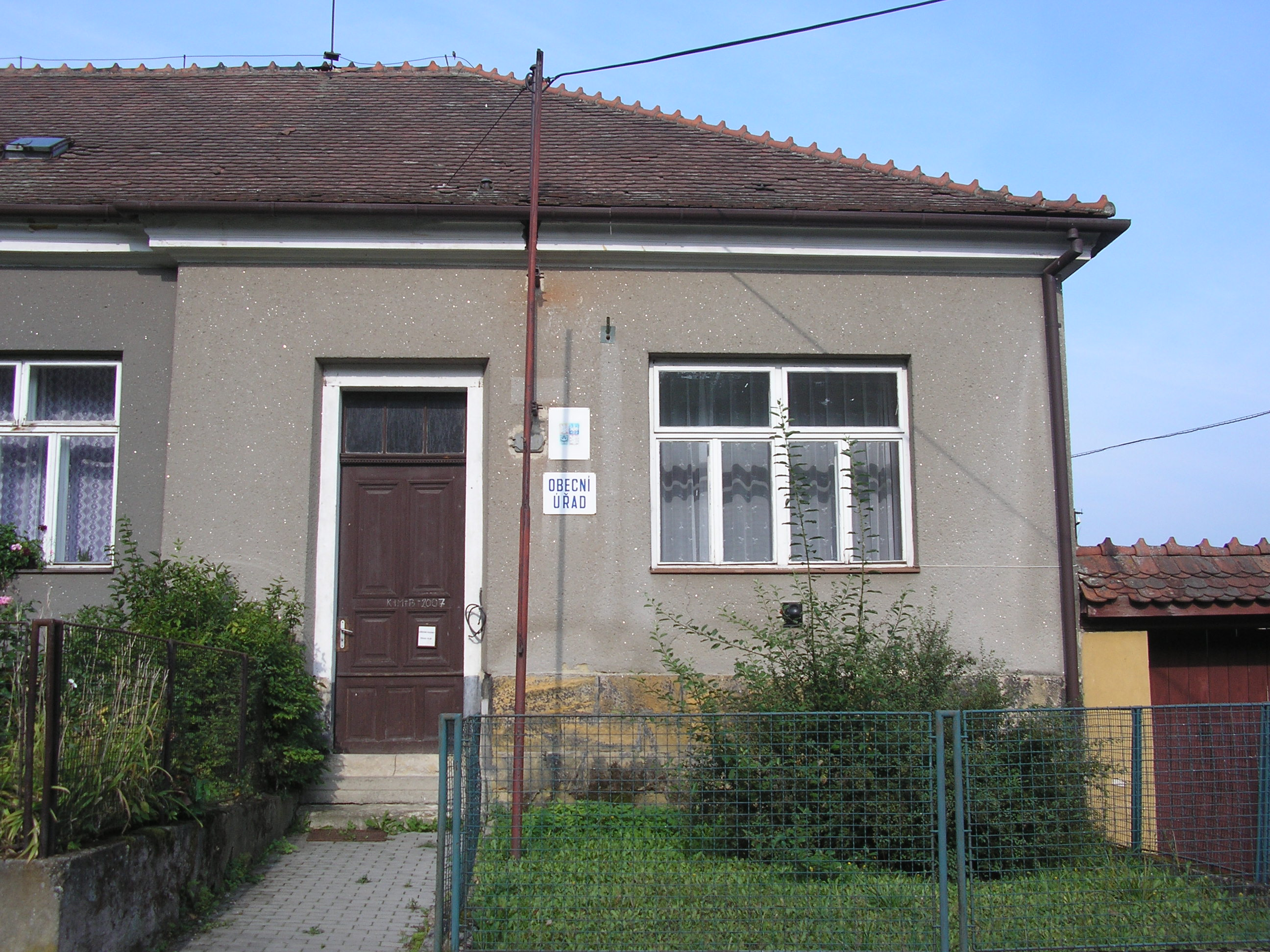 Obecní úřad Chrudichromy